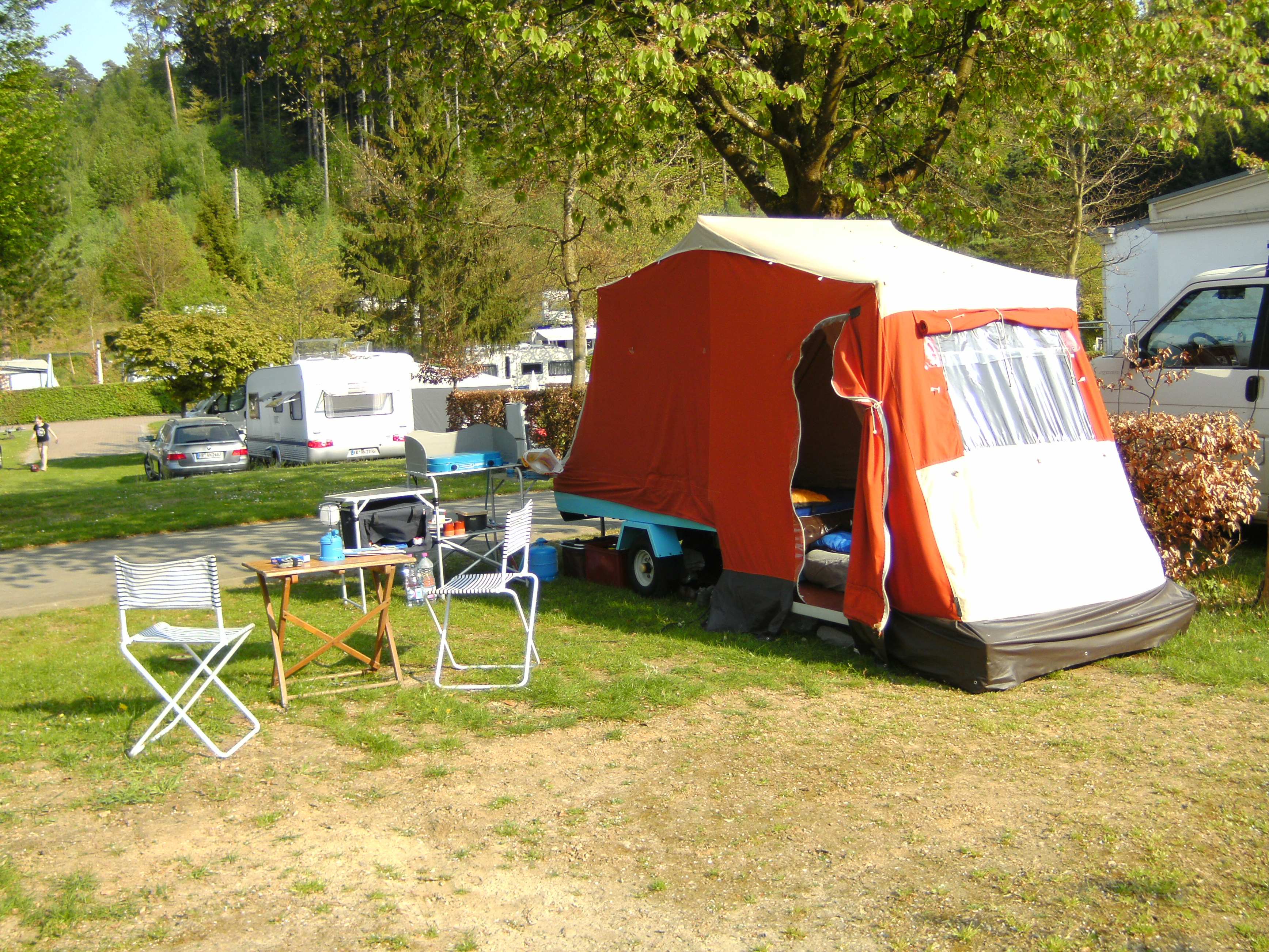 Der nach hinten umgeklappte Polyesterdeckel dient beim aufgebauten Zeltanhänger als Boden, die Ladefläche als Bett.